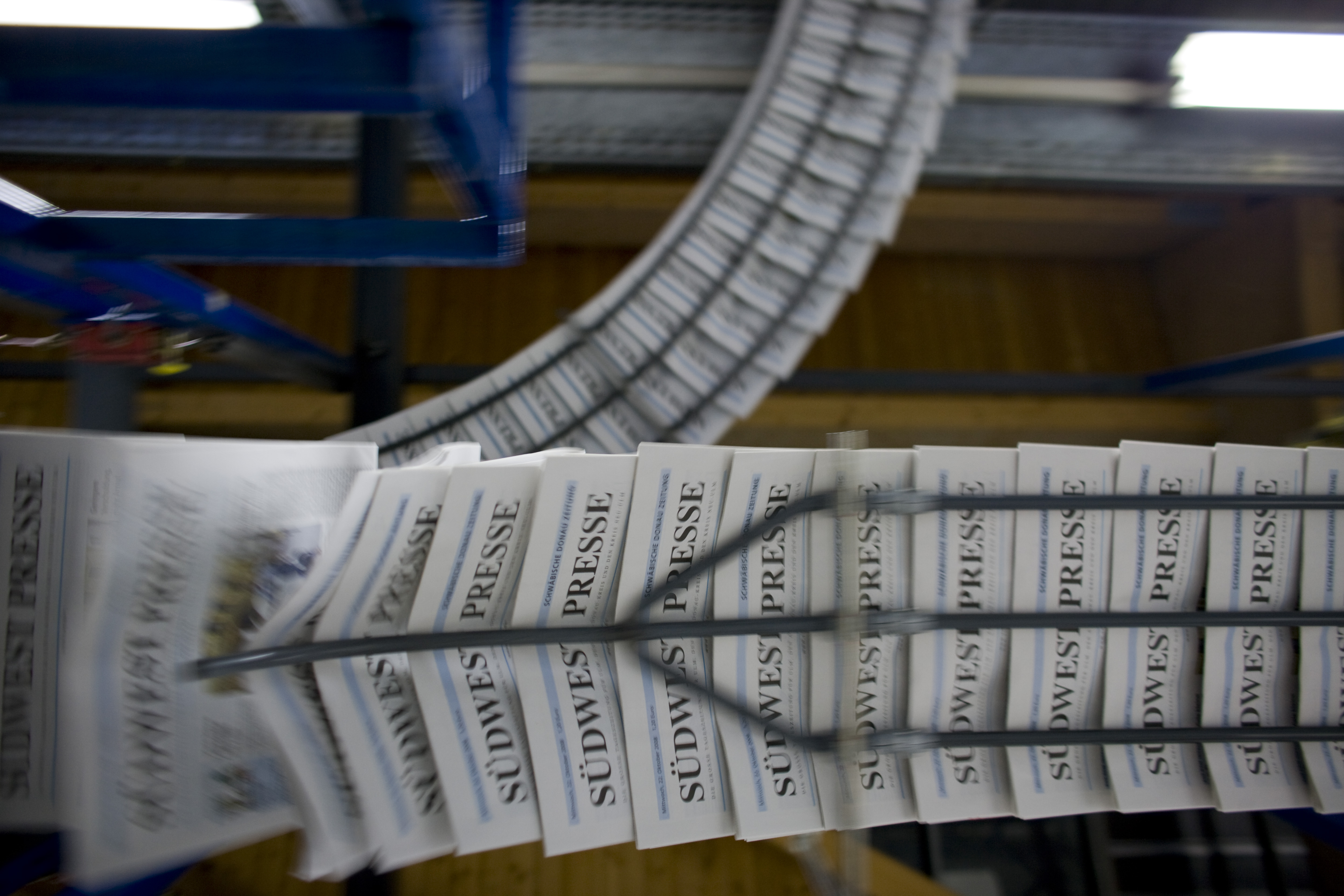 Im Partnerverbund der SÜDWEST PRESSE erscheinen täglich rund 400.000 Exemplare der Tageszeitung, die täglich von mehr als 1 Millionen Menschen gelesen werden.